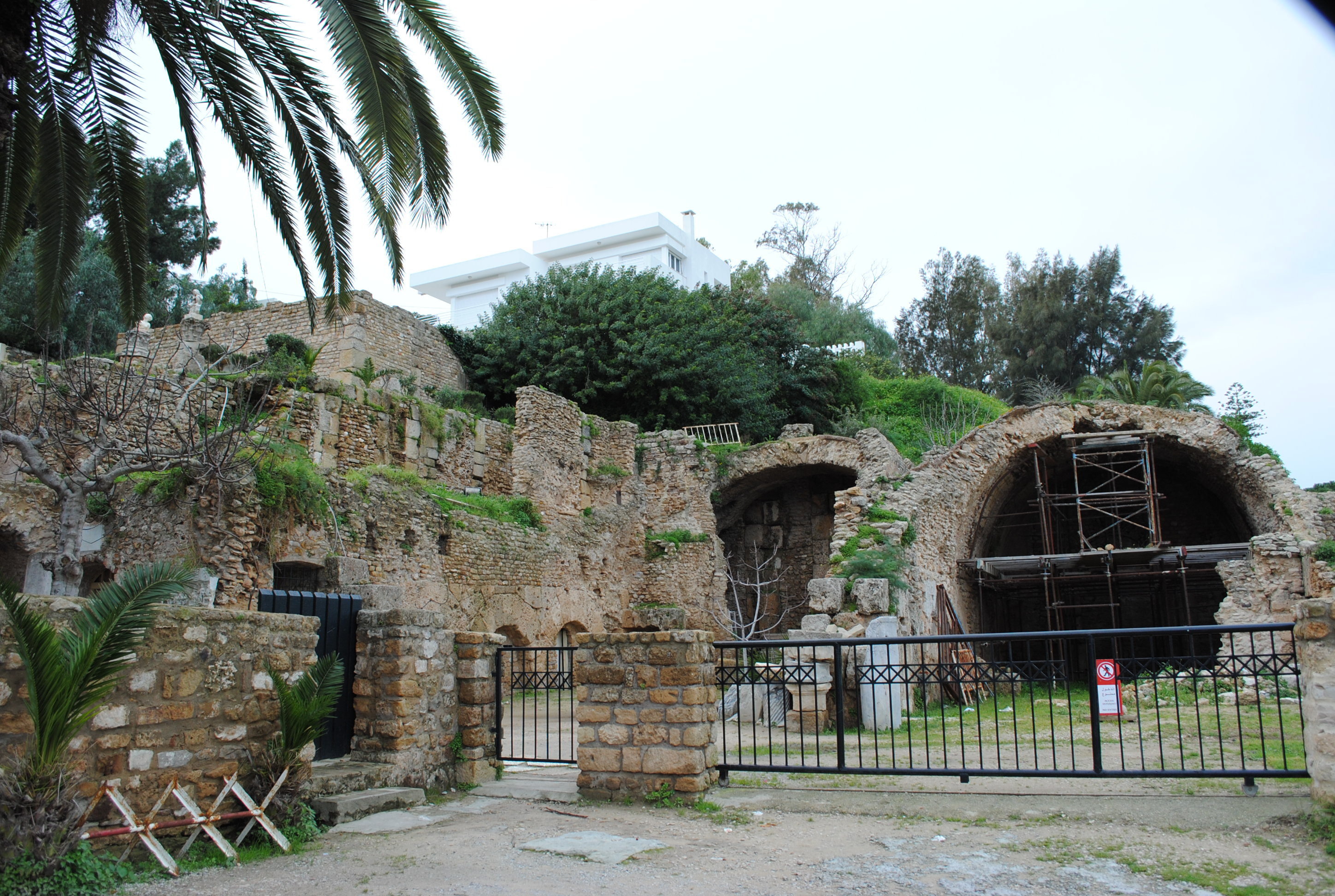 Villa des Bains ?